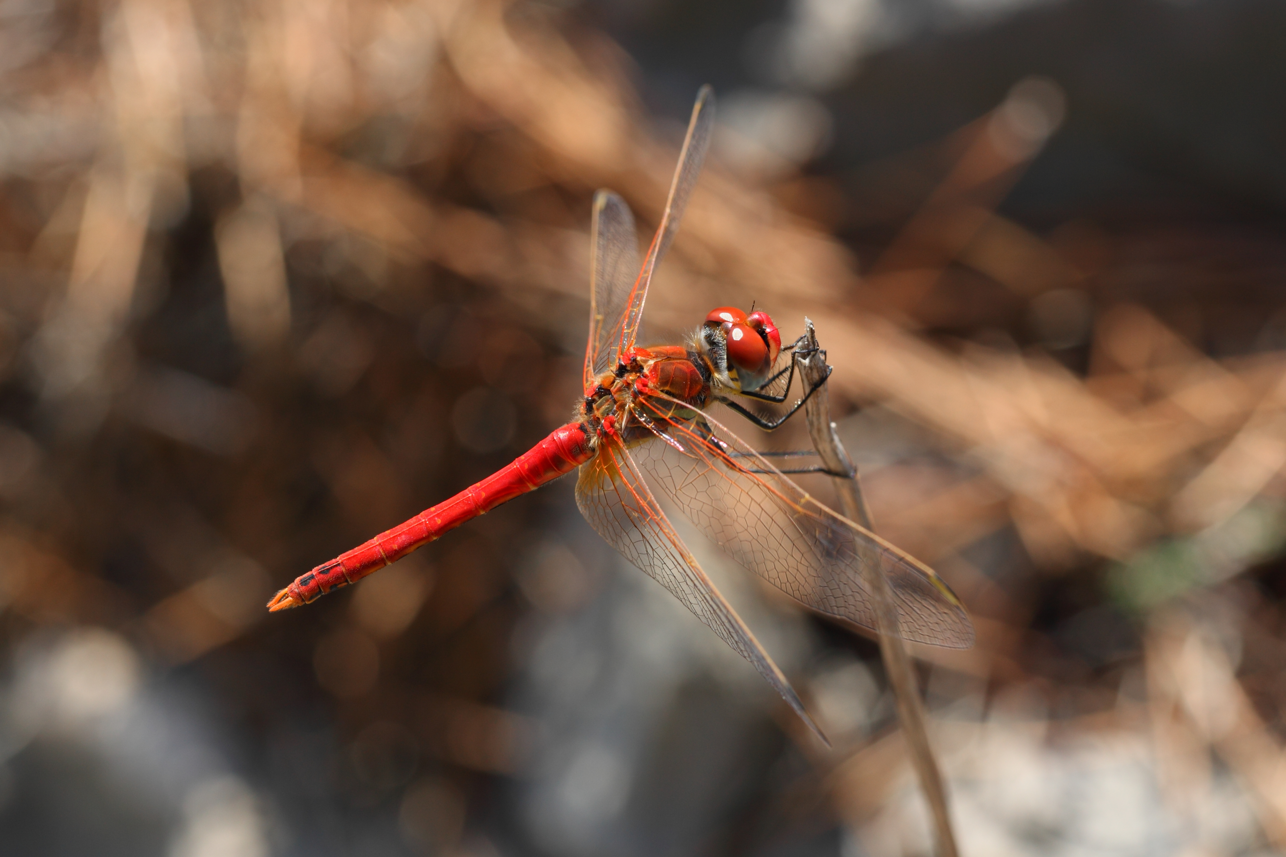 Frühe Heidelibelle Sympetrum fonscolombii (Männchen) in Frankreich, Calanque de Port Miou.